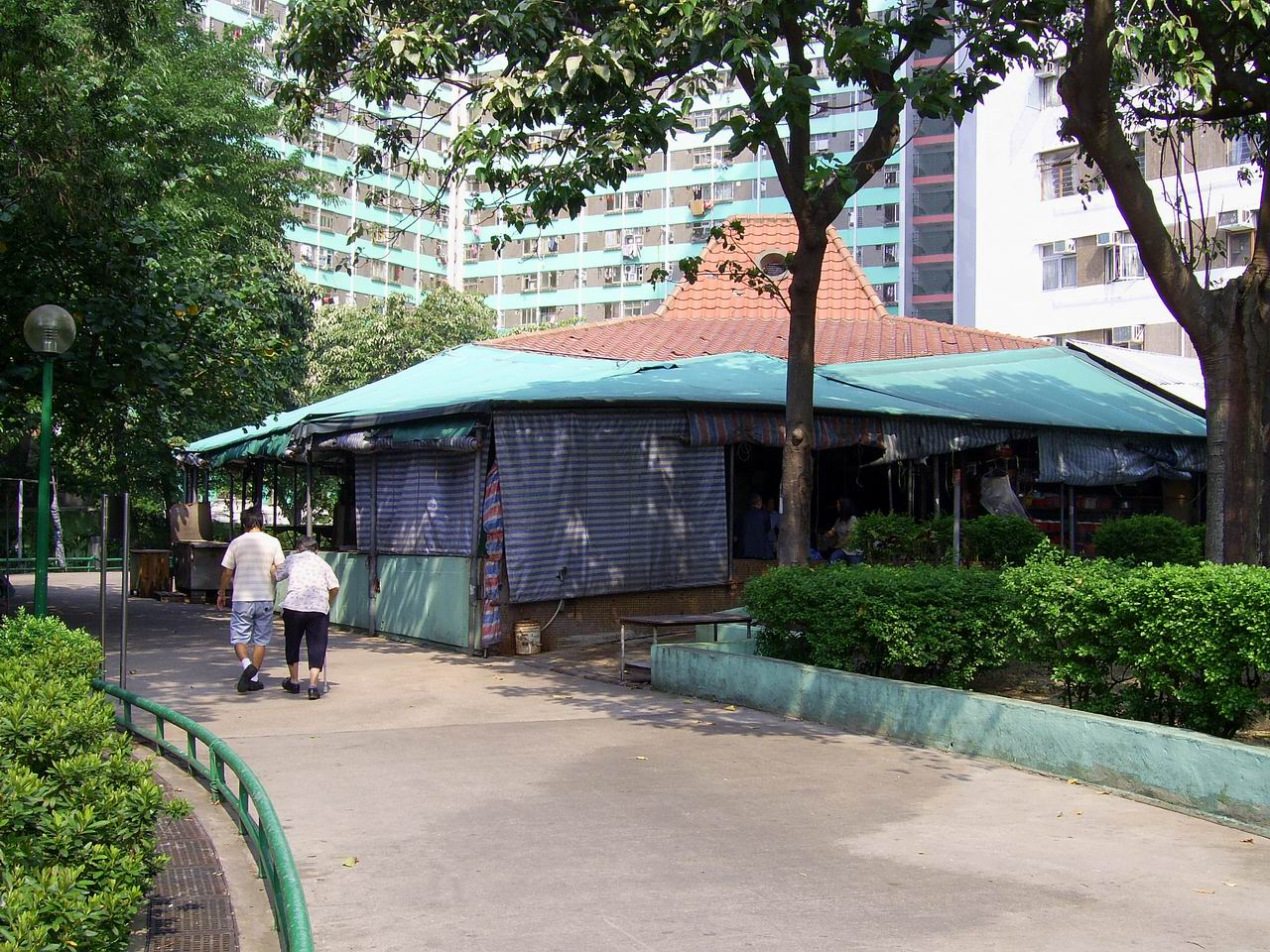 中文（香港）: 廣福邨的冬菇亭